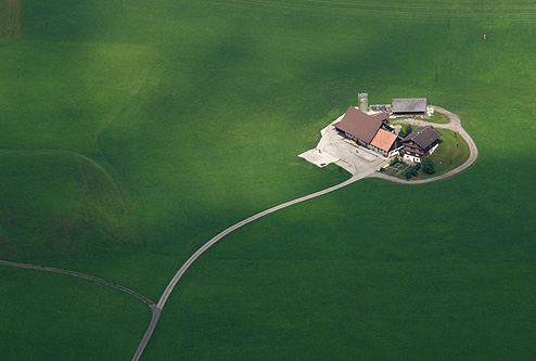 Stans: Blick vom Stanserhorn auf einen Bauernhof